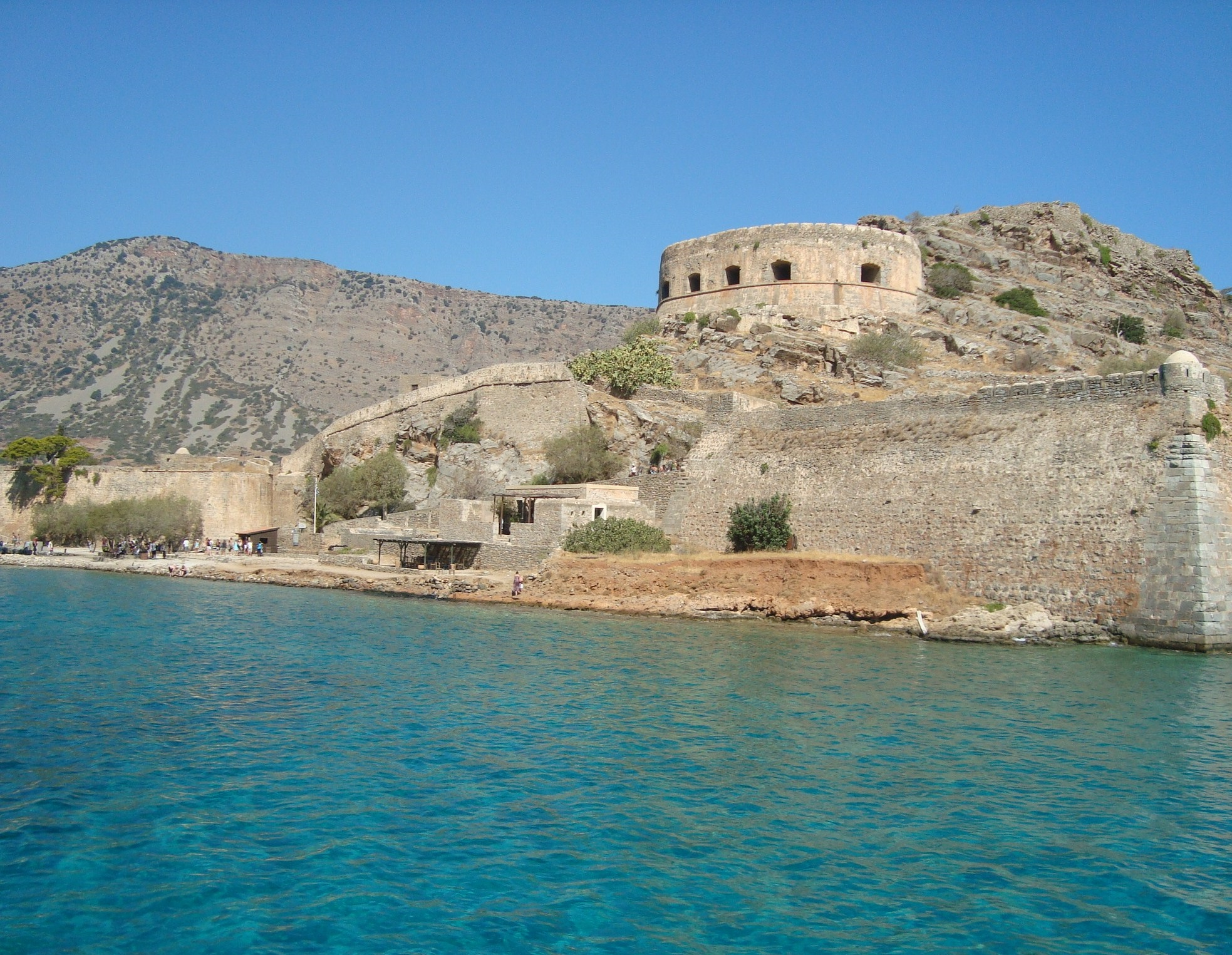 Le fort de l'île de Spinalonga